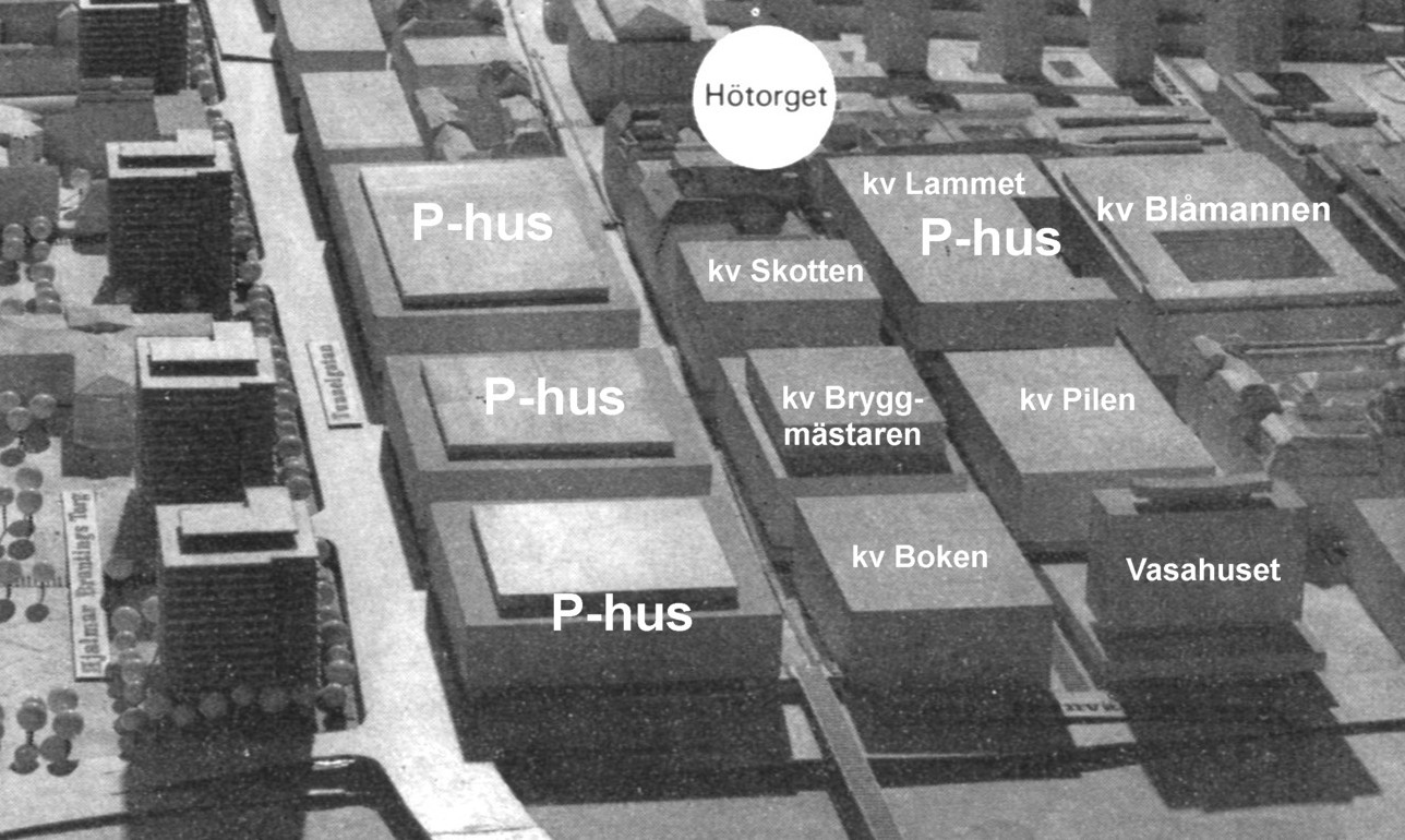 Modell för City 67 med planerade P-hus i västra City (markerade av Holger Ellgaard)